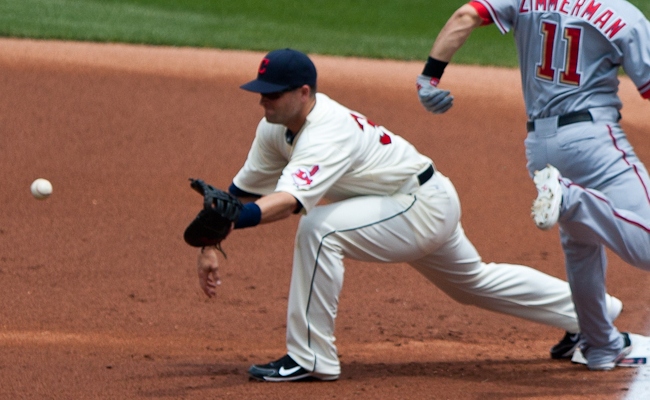 Russell Branyan